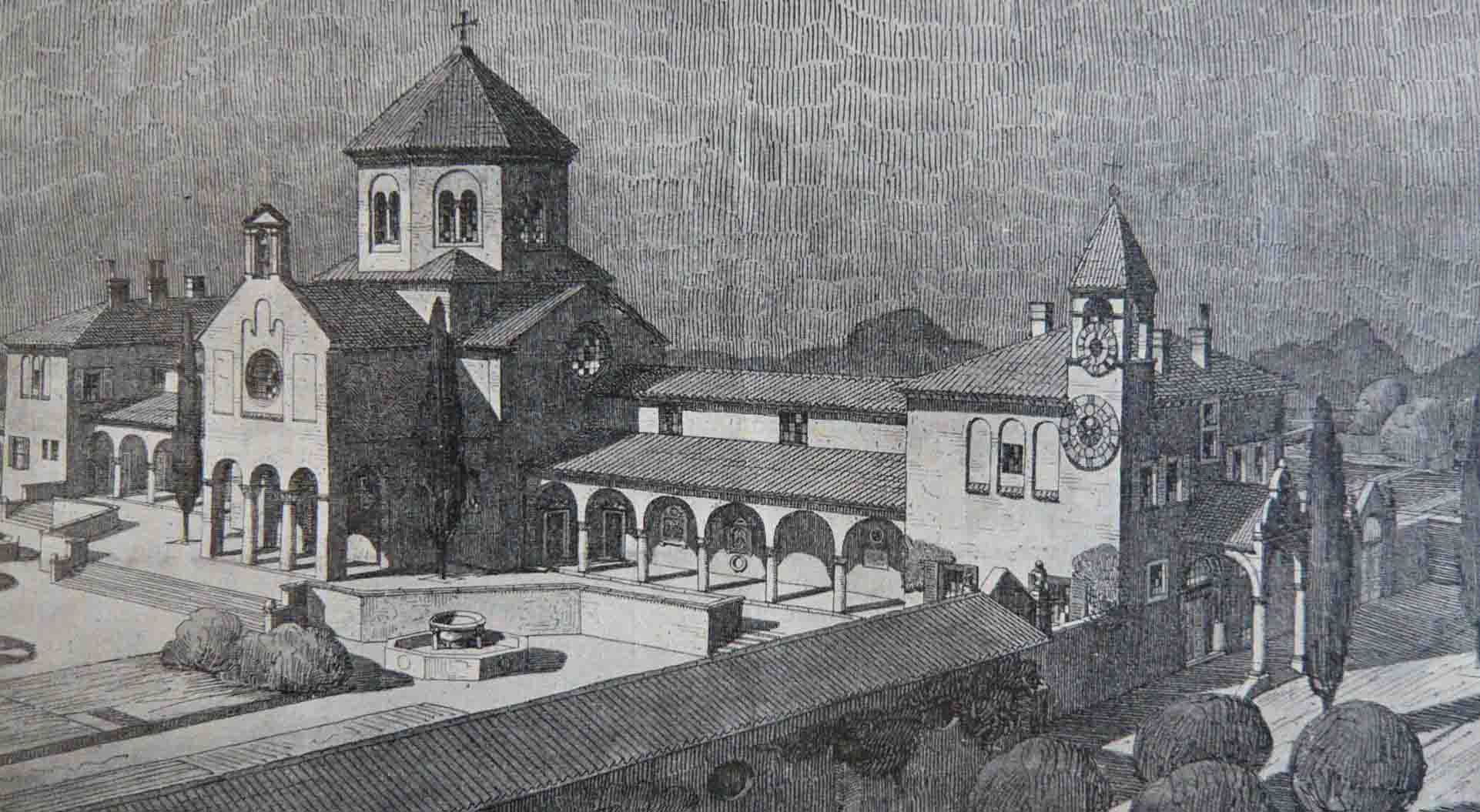 Friedhof, Meran (1907–1908, in Zusammenarbeit mit Architekt Schmitz aus Nürnberg)